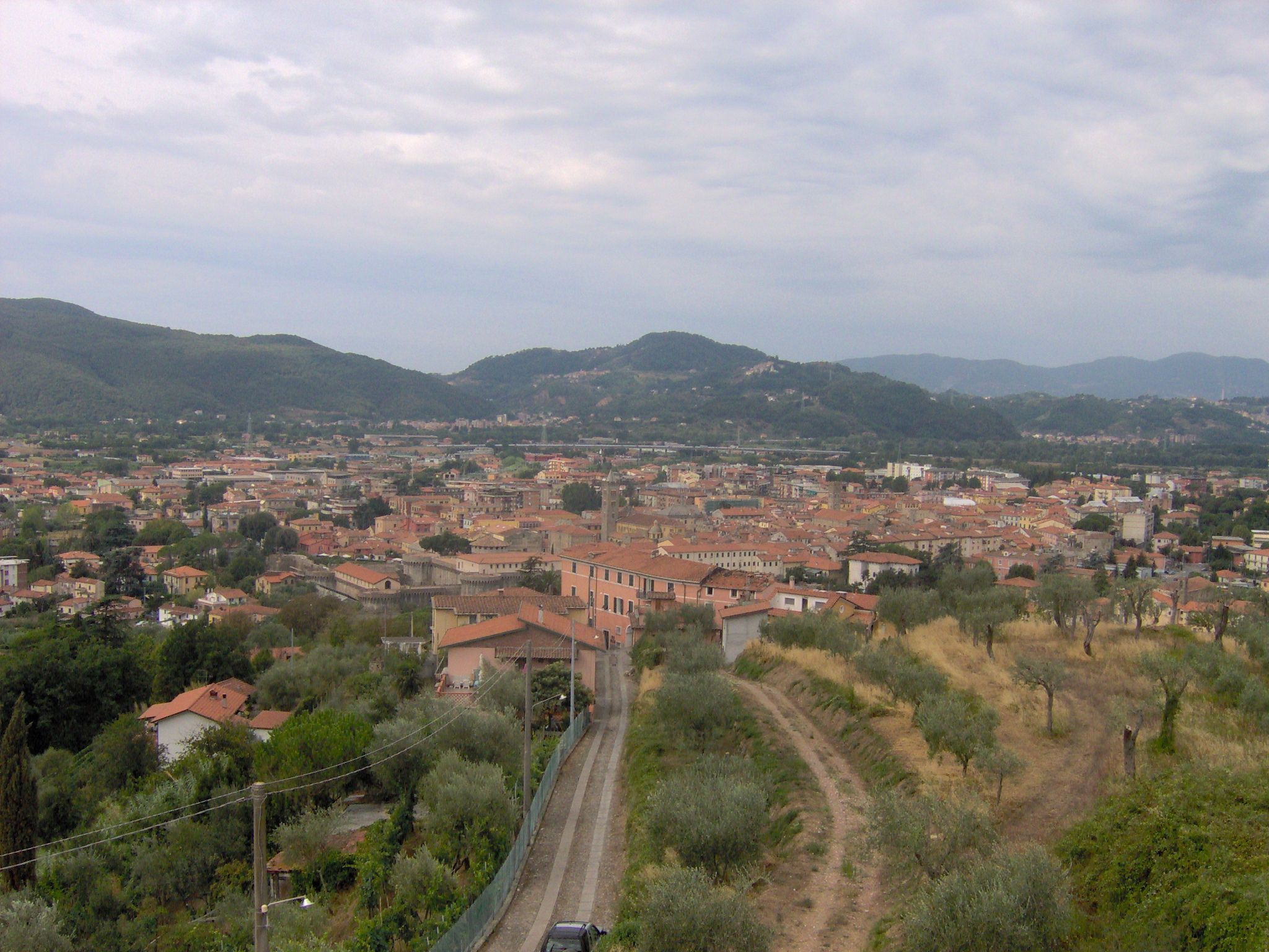 foto provincia spezia